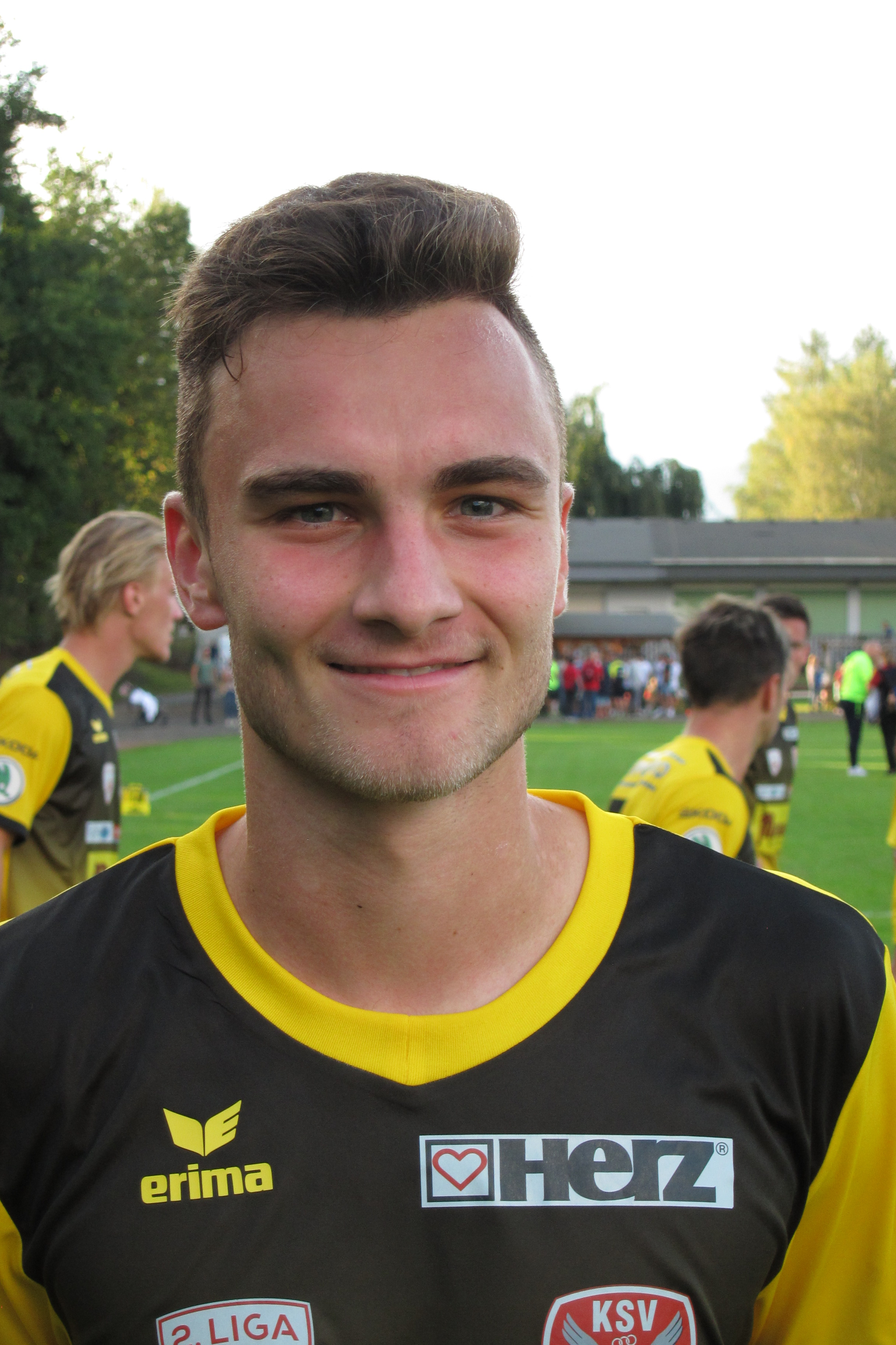 Lukas Skrivanek (KSV)